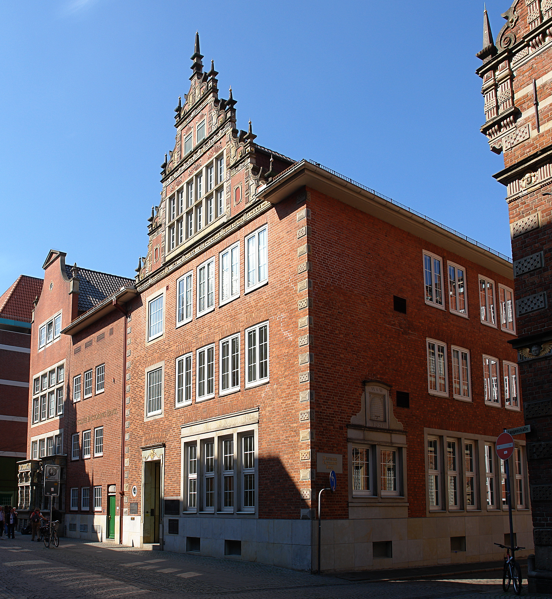 Bankhaus Martens und Weyhausen in Bremen, Langenstraße 15–21. Das abgebildete Objekt ist ein geschütztes Kulturdenkmal in der Freien Hansestadt Bremen, mit der Nr. 0832 beim Landesamt für Denkmalpflege registriert.